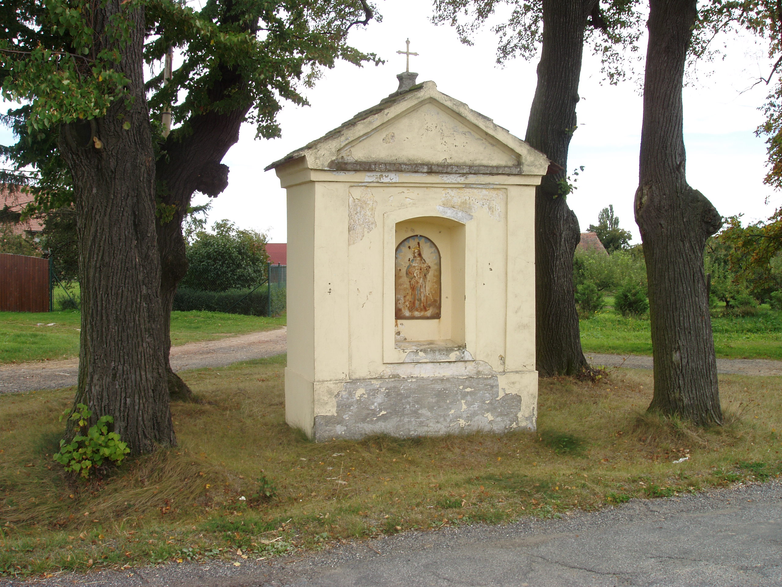 Kaple sv. Jana Nepomuckého (Krupá), při silnici k Bykáni, Krupá